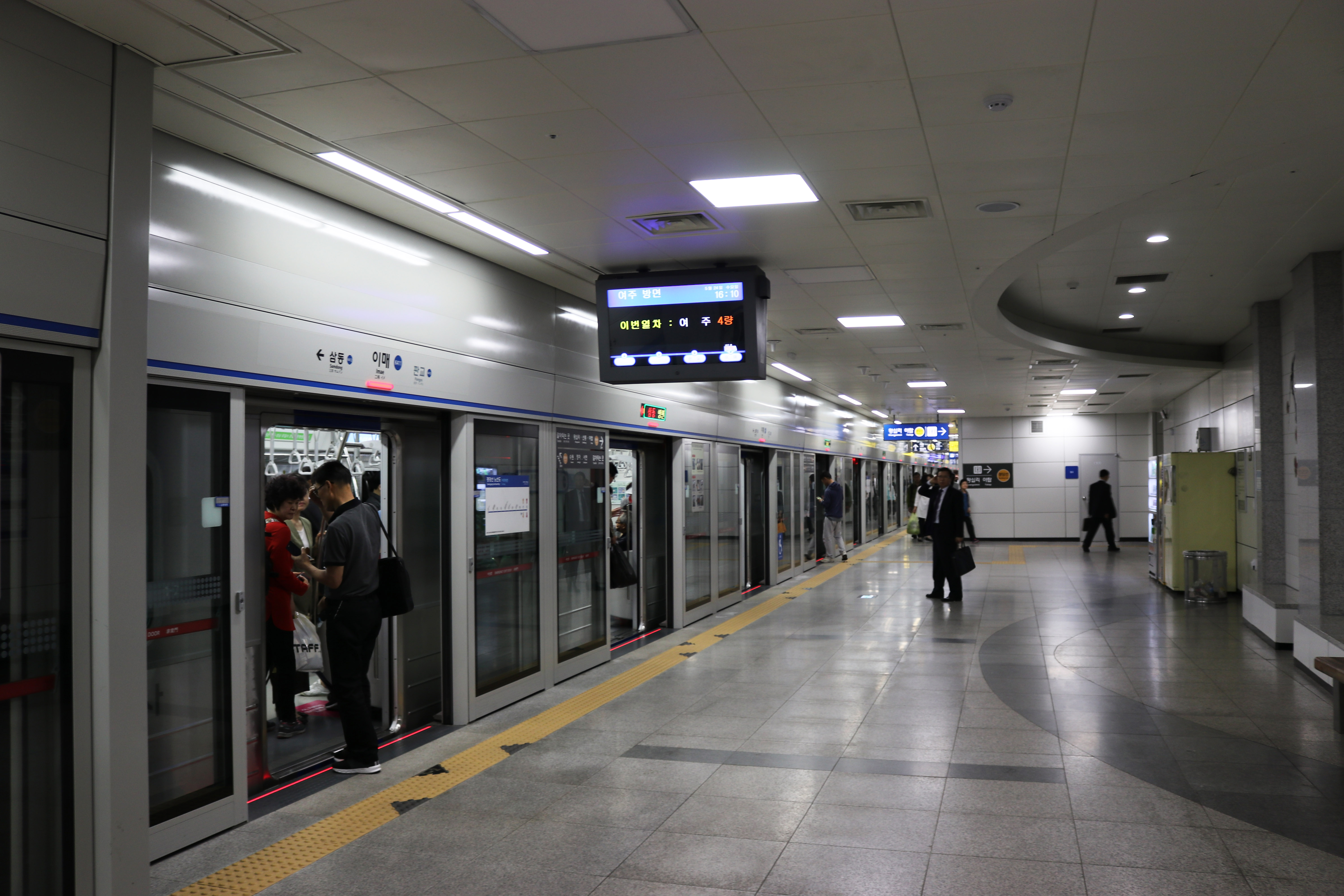 이매역 경강선 승강장